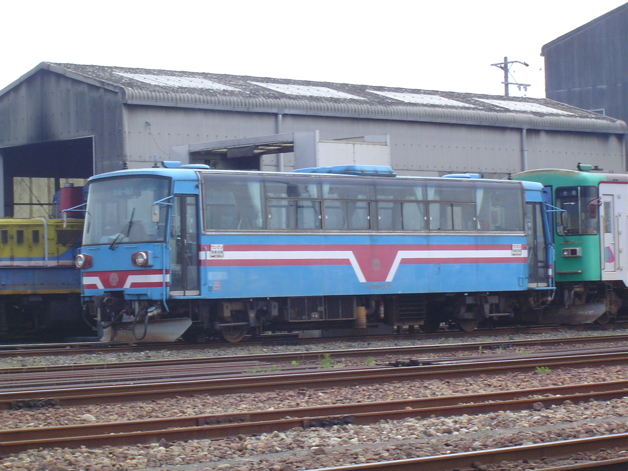 Tarumi-Railway_Haimo180-202.jpg